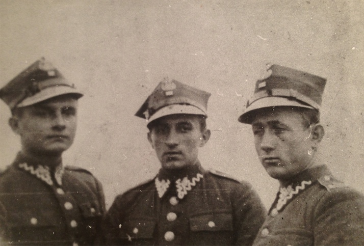 Szkoła Podchorążych w Komorowie, k. Ostrowi Mazowieckiej, po lewej Zygmunt Pawlus